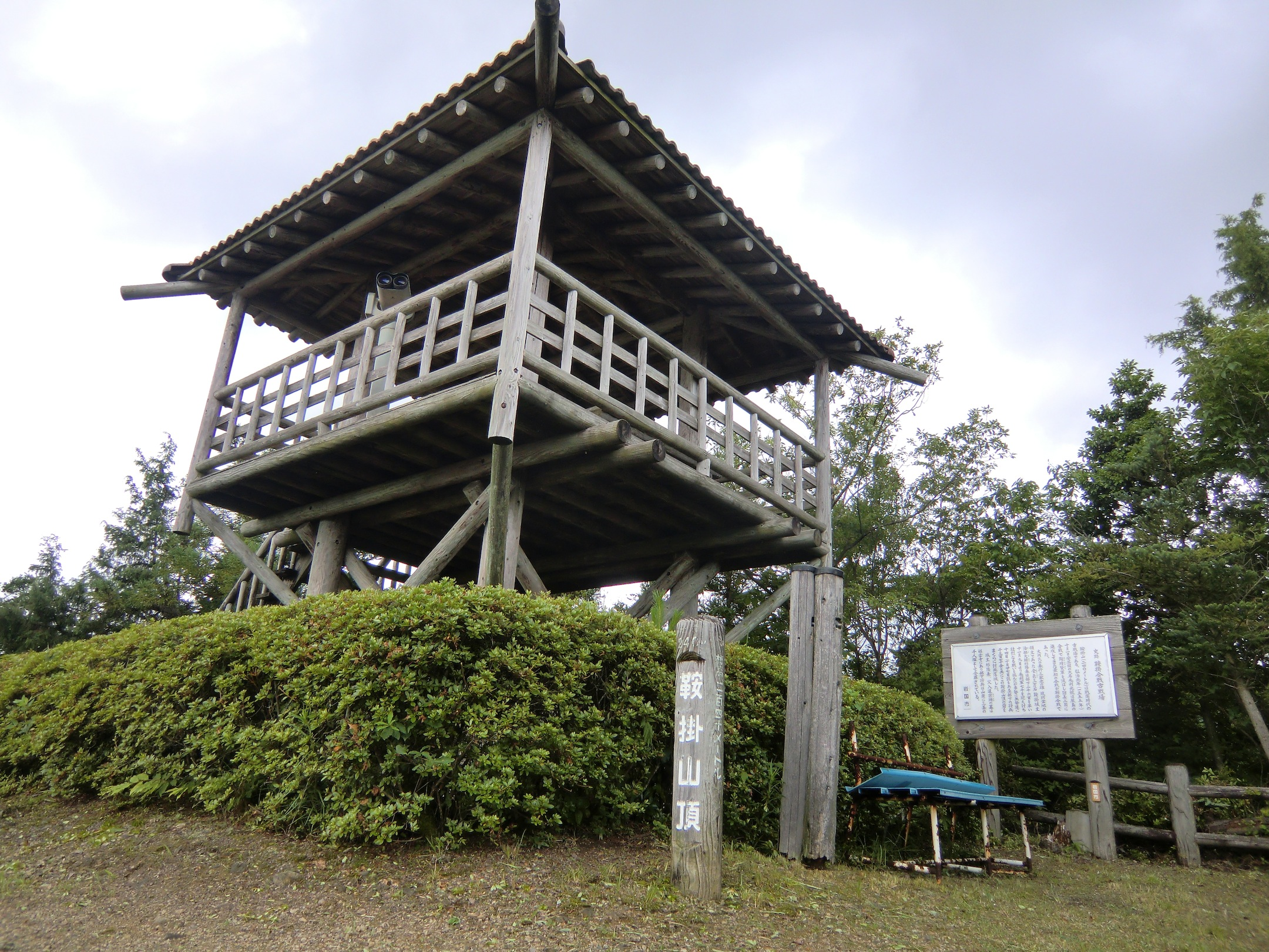 岩国市玖珂町の鞍掛山頂上。